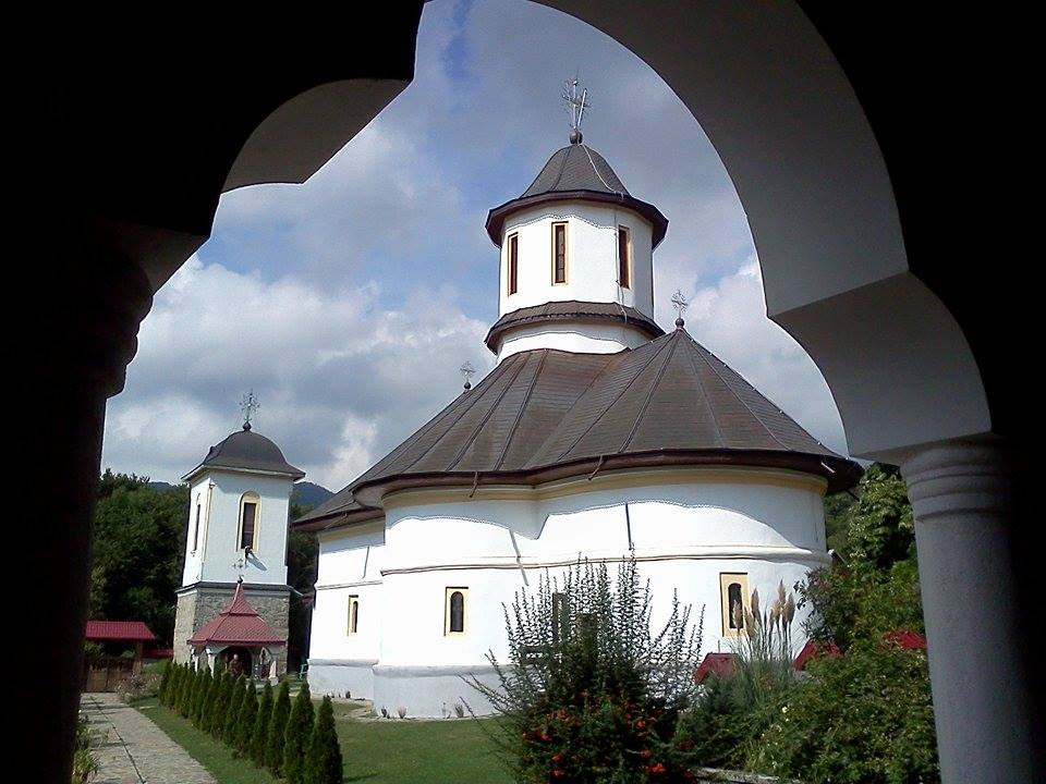 Schitul Crasna